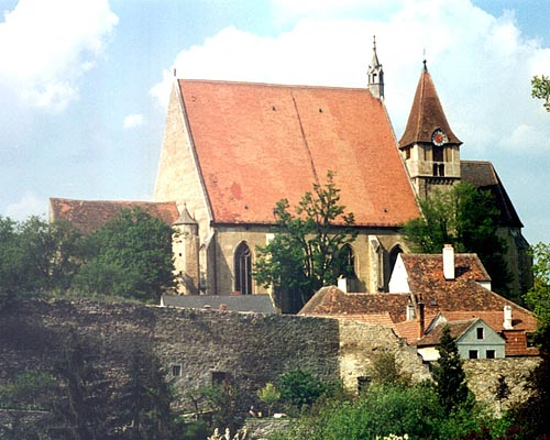 Eggenburg